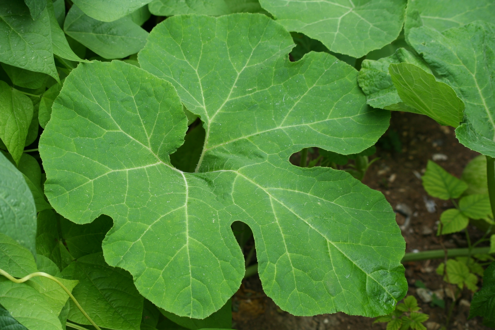 Feuille de courge de Siam (Cucurbita ficifolia)